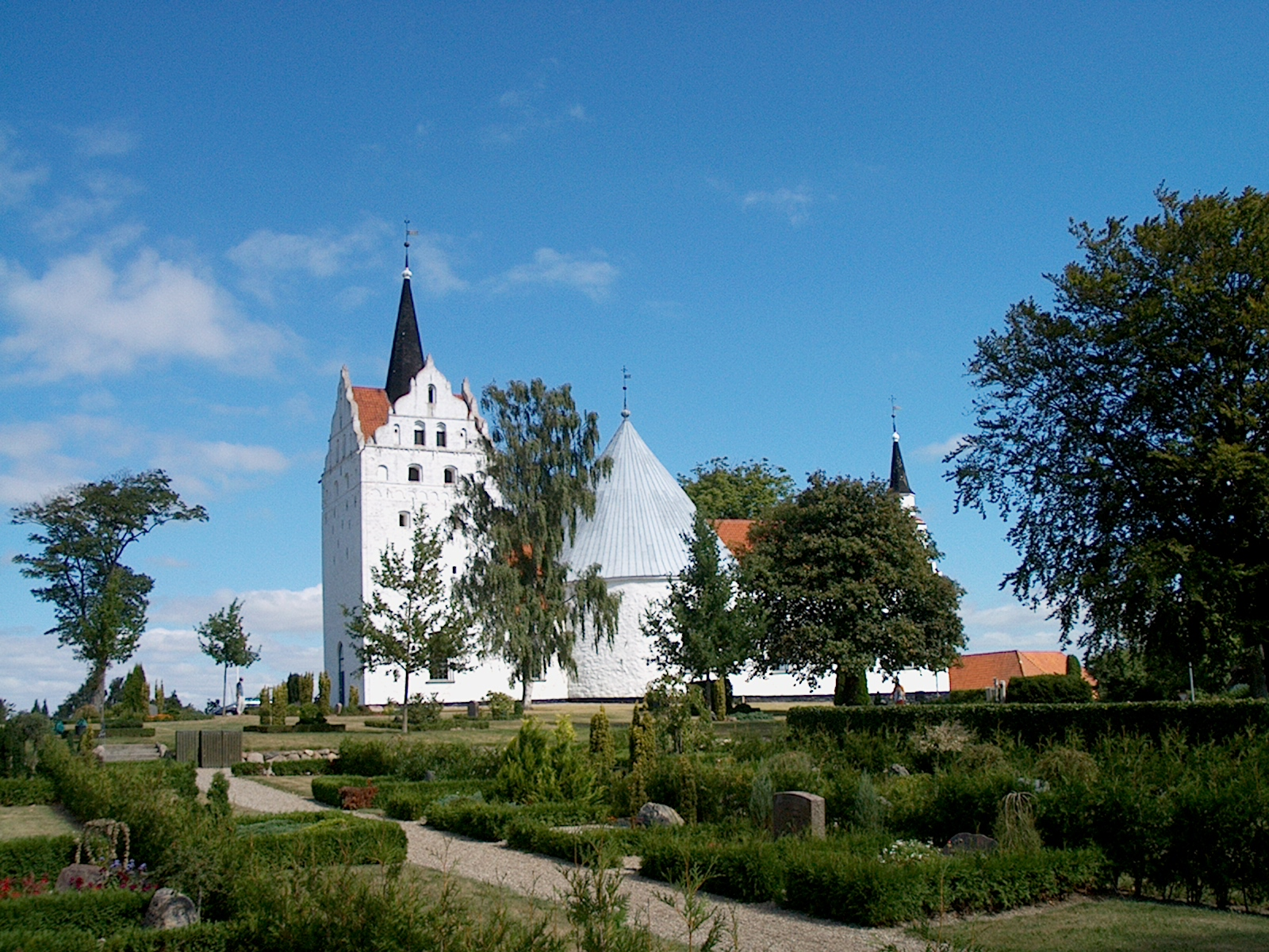 Horne Kirke ved Fåborg. Fyens største landsbykirke og eneste rundkirke, består af en oprindelig romansk rundbygning, som fra starteb har haft to stokværk, med kor og tårn, tårnet er fra Slutningen af det 16. årh.